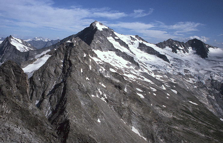 Der Große Löffler (3376 m) in den Zillertaler Alpen